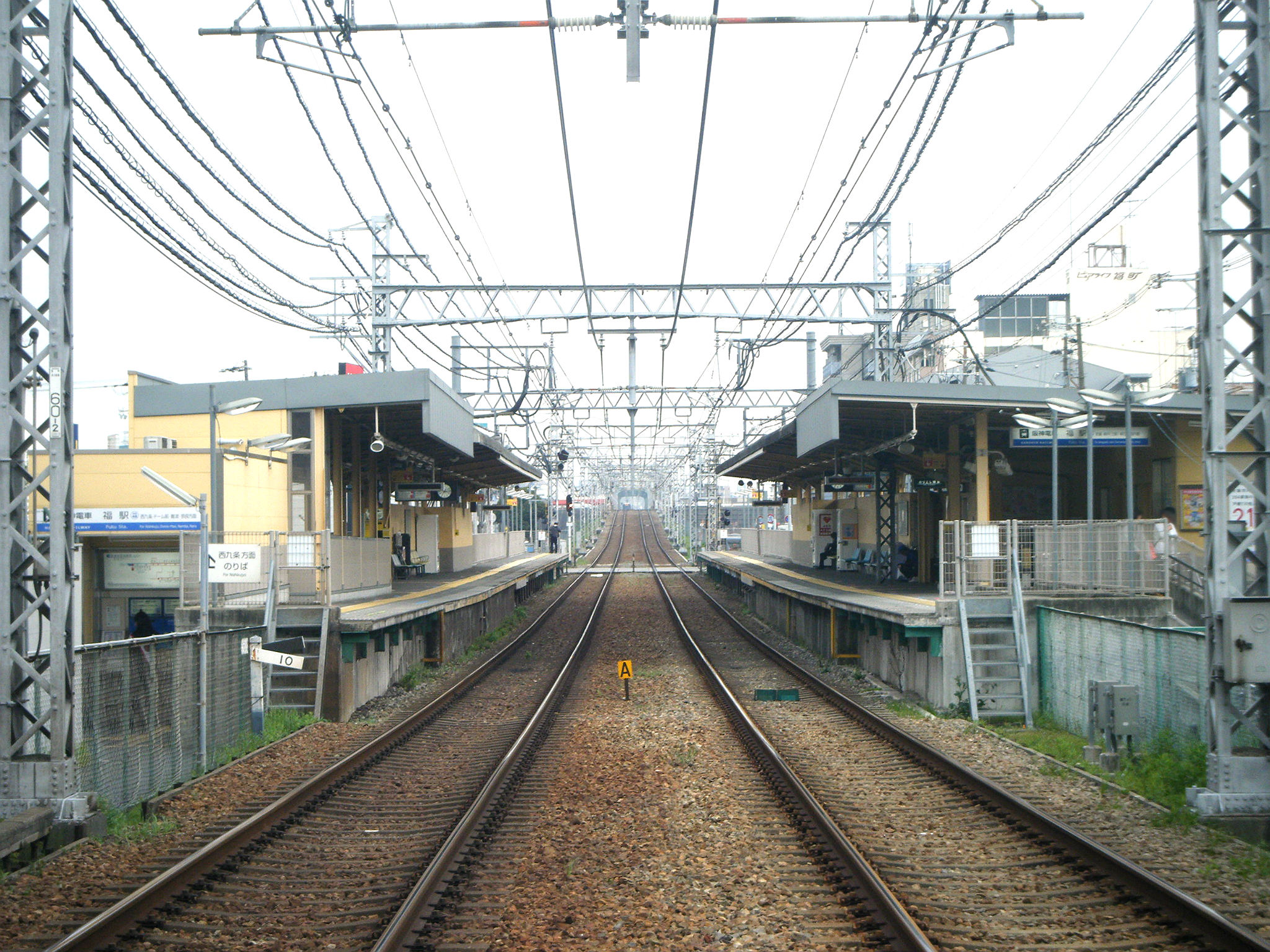 阪神なんば線 福駅 尼崎側より構内を臨む